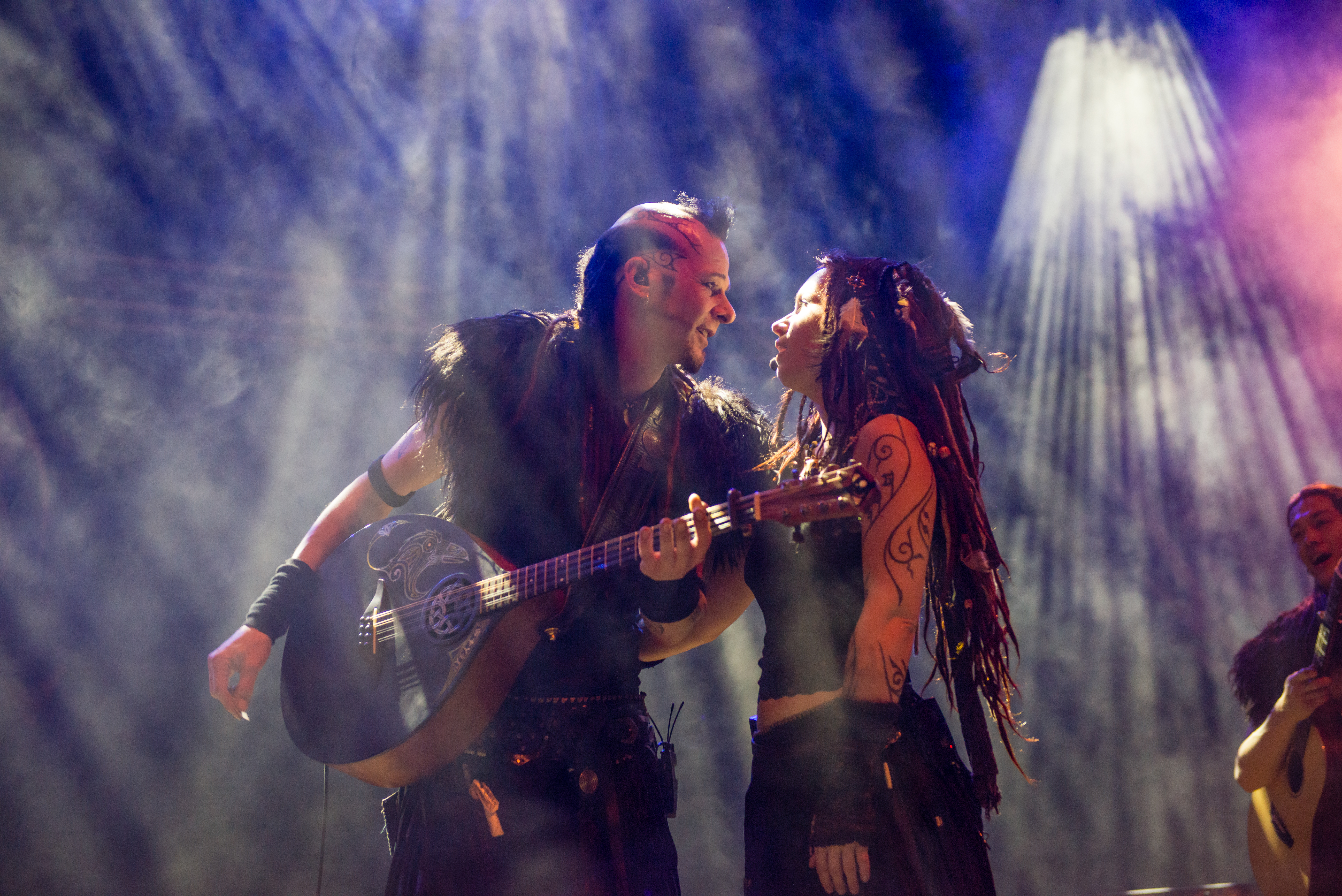 'Mittelalterlich Phantasie Spectaculum 2014': 'Omnia'